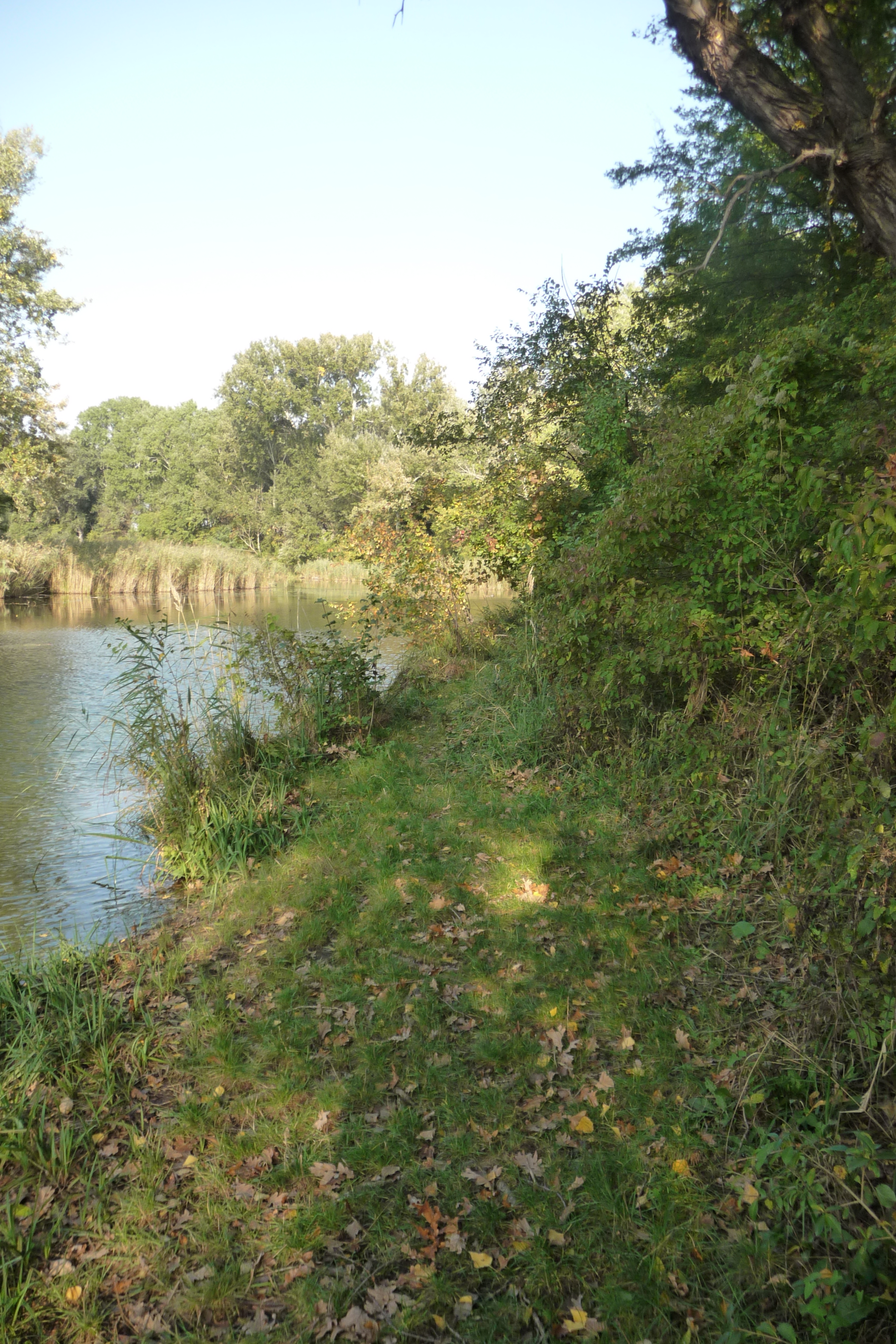 bras mort, banbe d herbe et debut de la foret